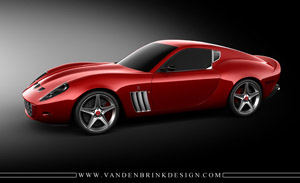 Vandenbrink 599/630 GTO